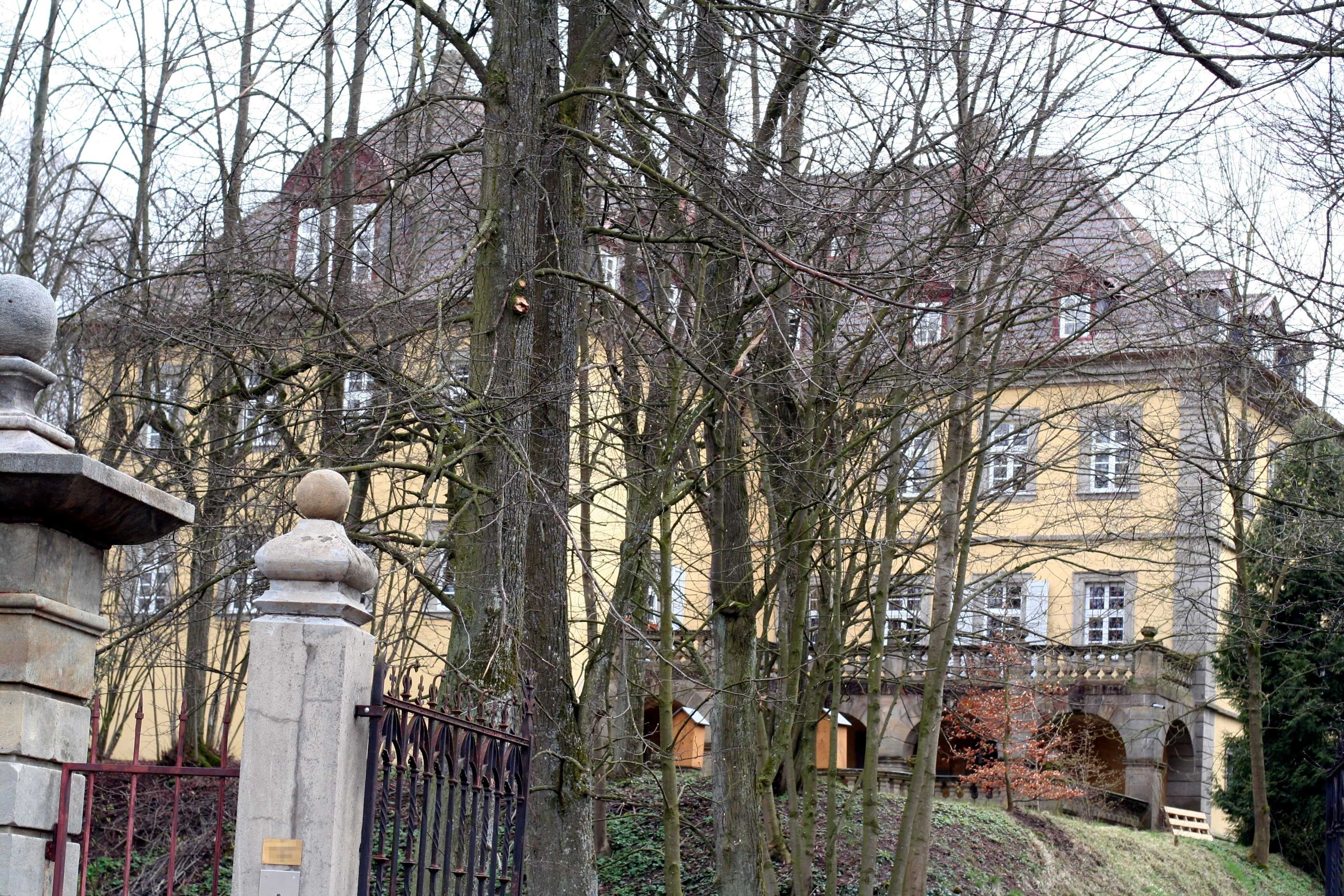 Beschreibung: Schloss in Hafenpreppach, Teil der Gemeinde Maroldsweisach im Landkreis Haßberge in Bayern Quelle: selbst fotografiert Störfix Datum: 6. April 2008